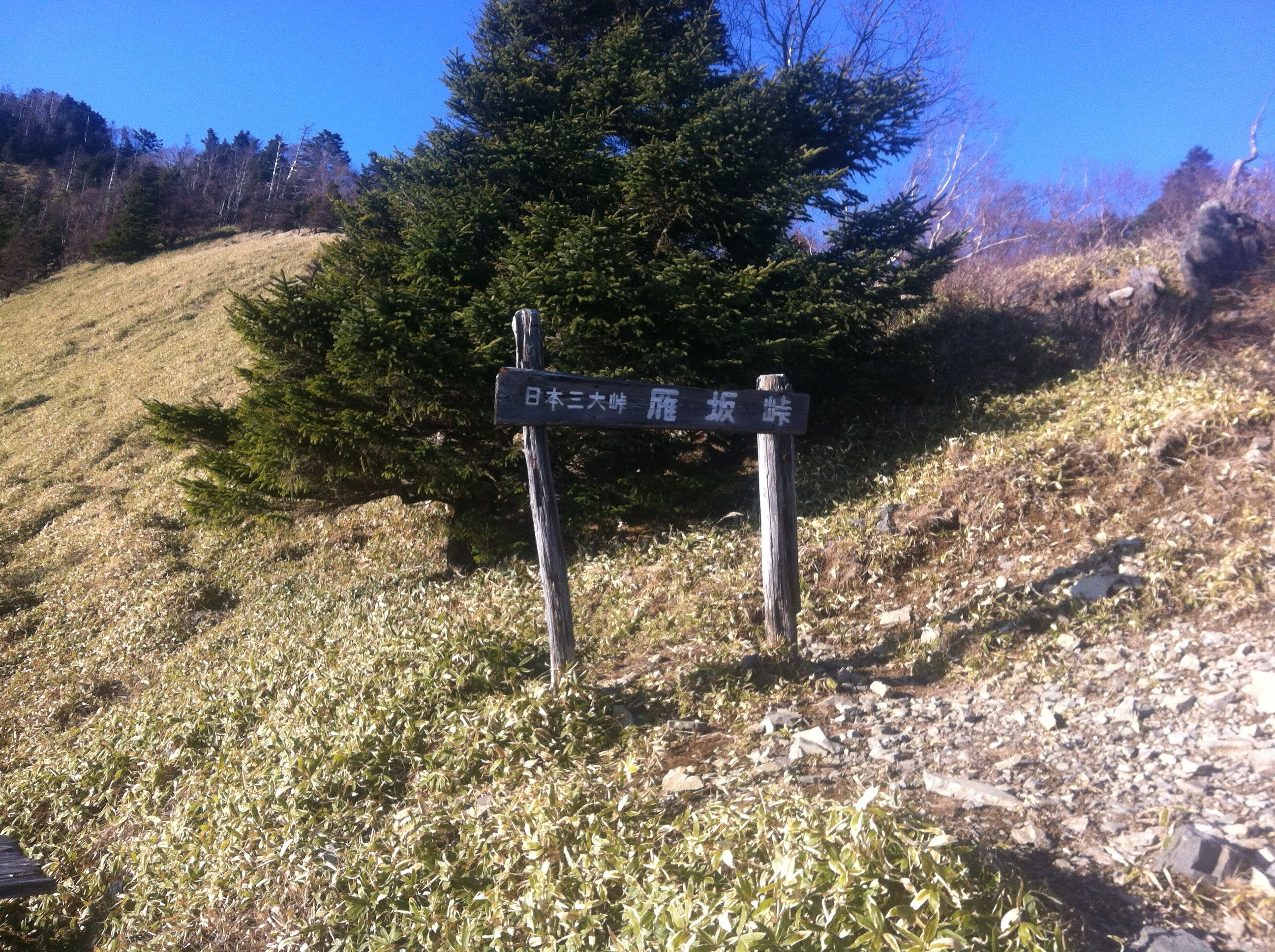 日本三大峠の雁坂峠です。